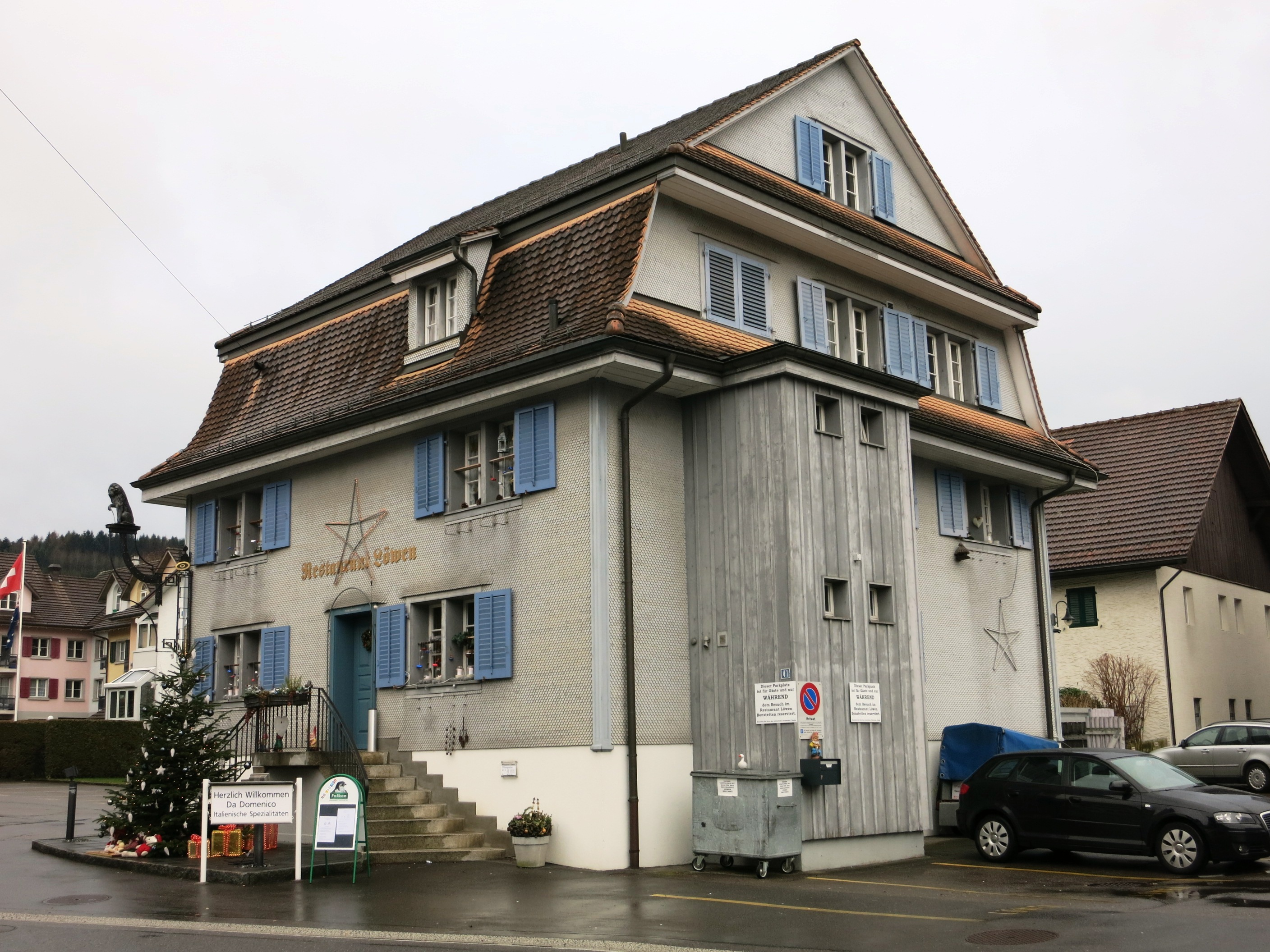 Gasthaus zum Löwen, Bonstetten ZH, Schweiz